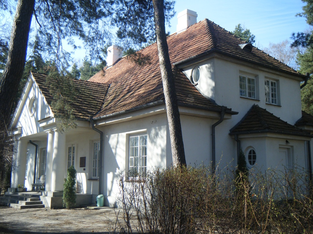 Dworek Józefa Piłsudskiego "Milusin" w Sulejówku.